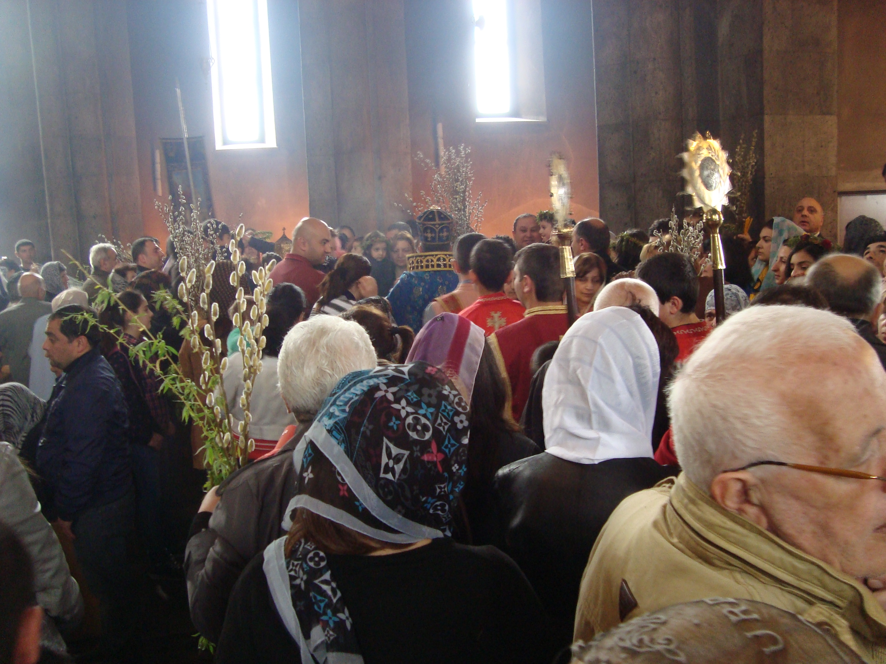 Ծաղկազարդ, Նոր-Նորքի Սուրբ Սարգիս